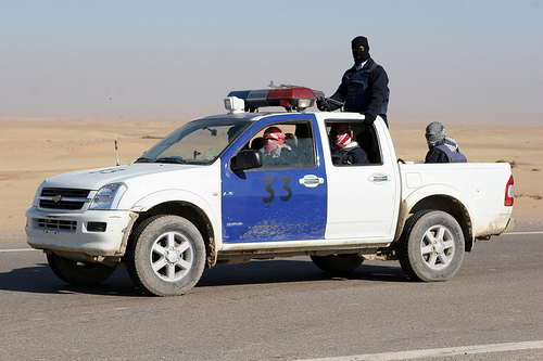 Iraqi Police, Ramadi, Iraq